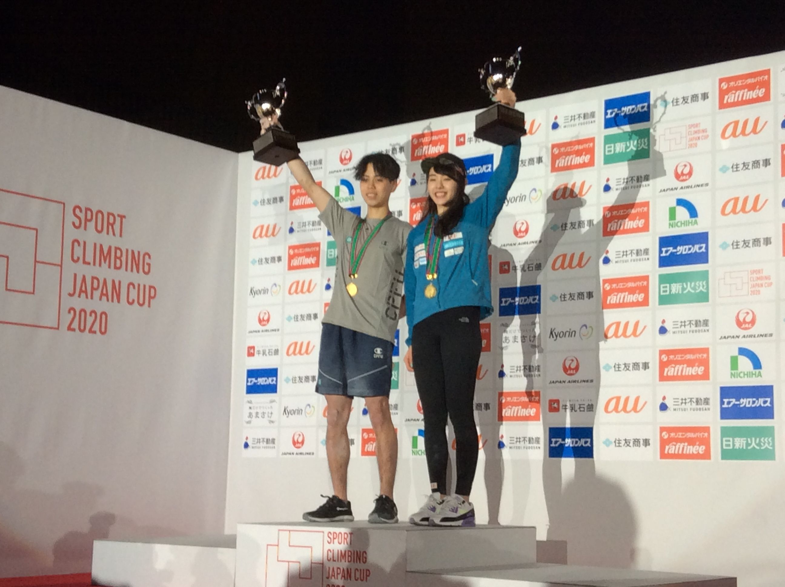 ボルダリング・ジャパンカップ 伊藤 ふたば